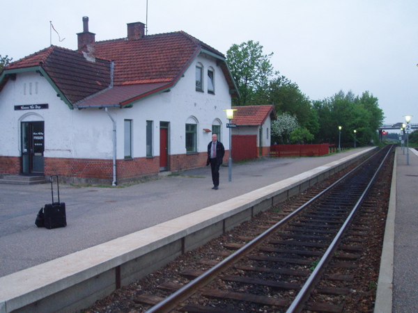 Billede.